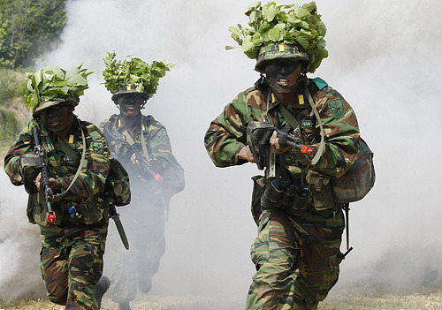 학사장교 훈련모습